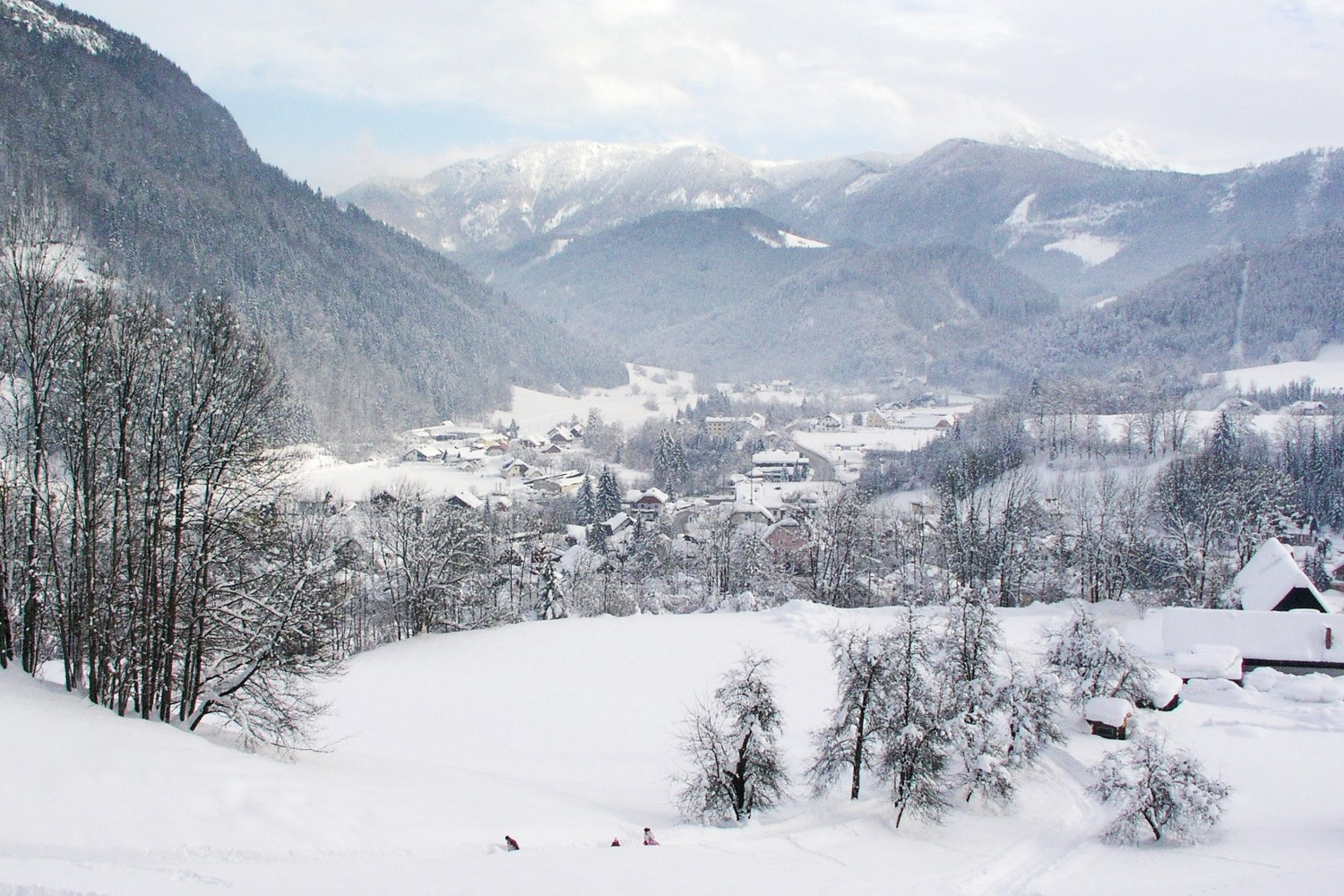 Description: Göstling an der Ybbs in Lower Austria - Göstling an der Ybbs in Niederösterreich own image - eigene Aufnahme, Jan. 06, 2006 Photographer: Martin Ortner, Vienna, Austria